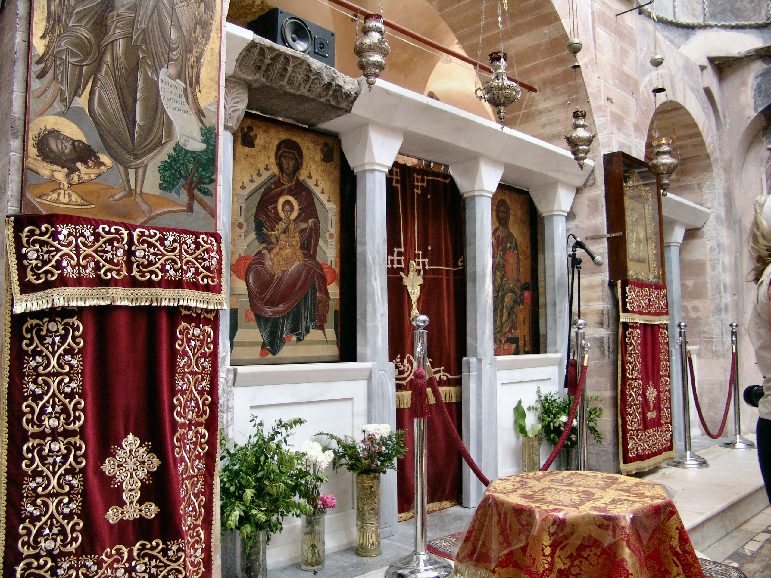 Nea Moni Monestary